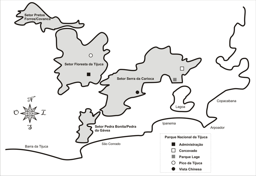 Mapa do PARNA-Tijuca